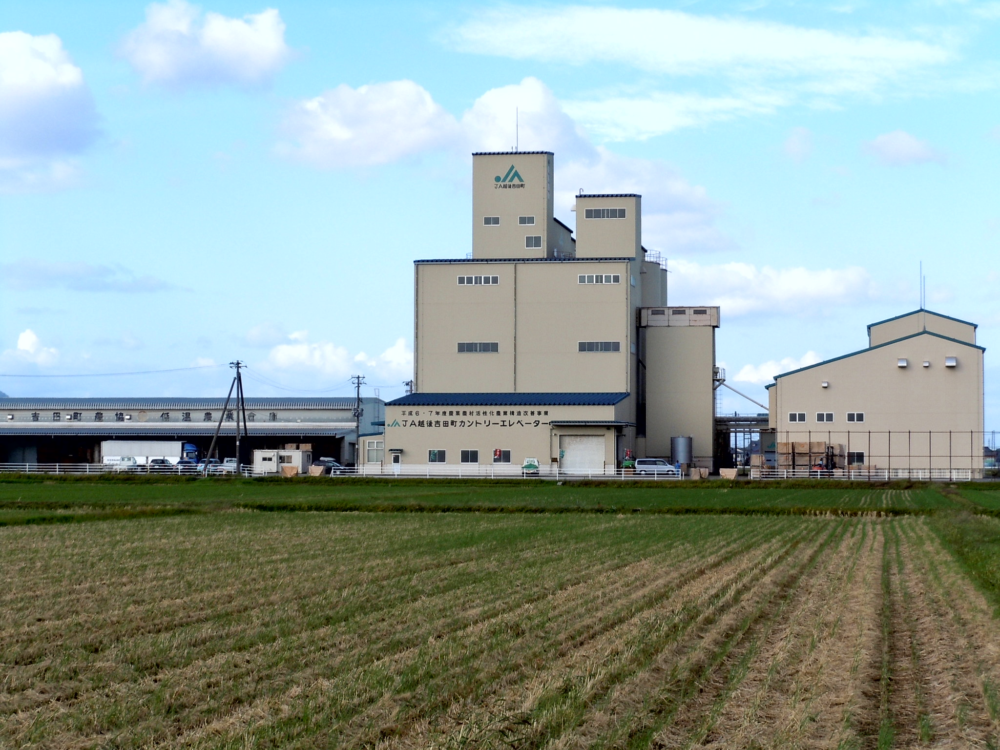 JA越後中央 吉田カントリーエレベーター（新潟県燕市）